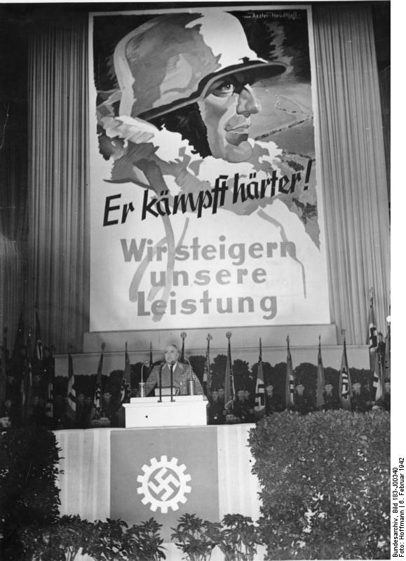 Berlin, Dr. Ley spricht im Sportpalast Dr. Ley zur Leistungssteigerungs-Aktion. Reichsorganisationsleiter Dr. Ley sprach am Freitag abend [6.2.42] im Berliner-Sportpalast beim Appell der Betriebsgemeinschaft Siemens. Mit dieser Rede eröffnete Dr. Ley die Leistungssteigerungs-Aktion im Gau Berlin. UBz.: Dr. Ley spricht. Fot. Hoffmann 7.2.42 Abgebildete Personen: Ley, Robert: Reichsorganisationsleiter, Deutsche Arbeitsfront (DAF), Generalrat der Wirtschaft, Deutschland